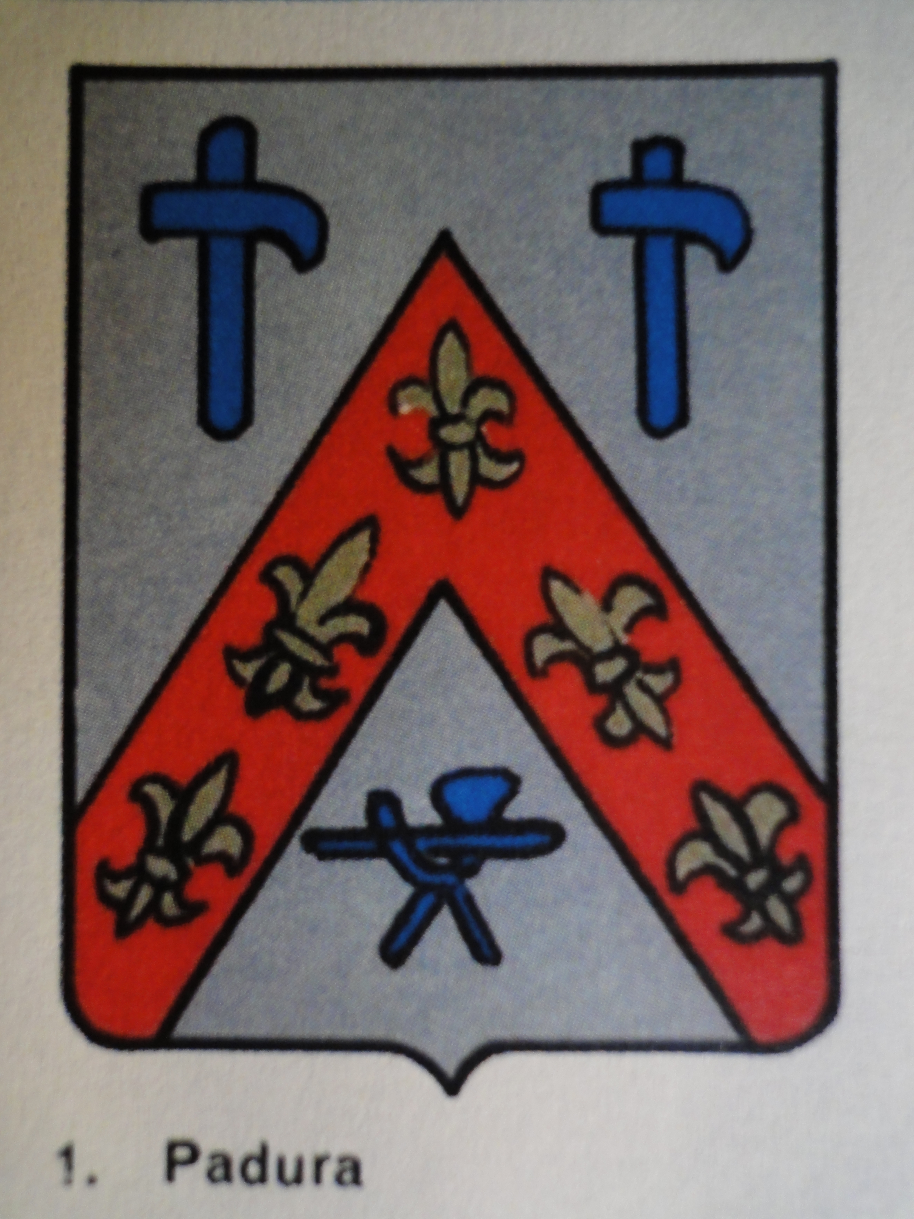 Escudo o Blason del apellido Padura (1)